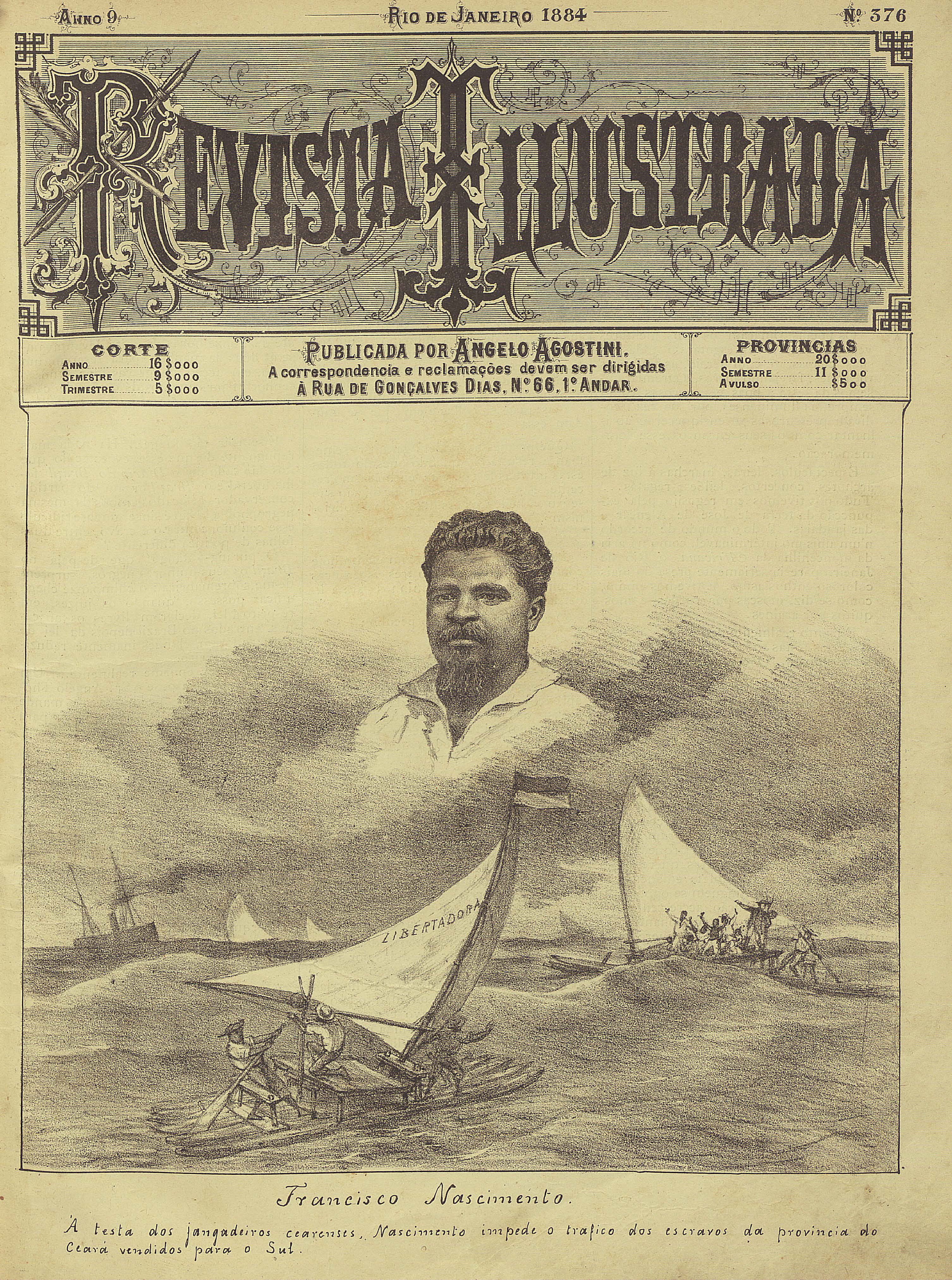 Capa da Revista Illustrada, v. 9, n. 376, 1884. Litogravura de Angelo Agostini (1843-1910), com ilustração alegórica de Francisco Nascimento (1839-1914), conhecido como Dragão do Mar, com a seguinte legenda: «À testa dos jangadeiros cearenses, Nascimento impede o tráfico dos escravos da província do Ceará vendidos para o sul».